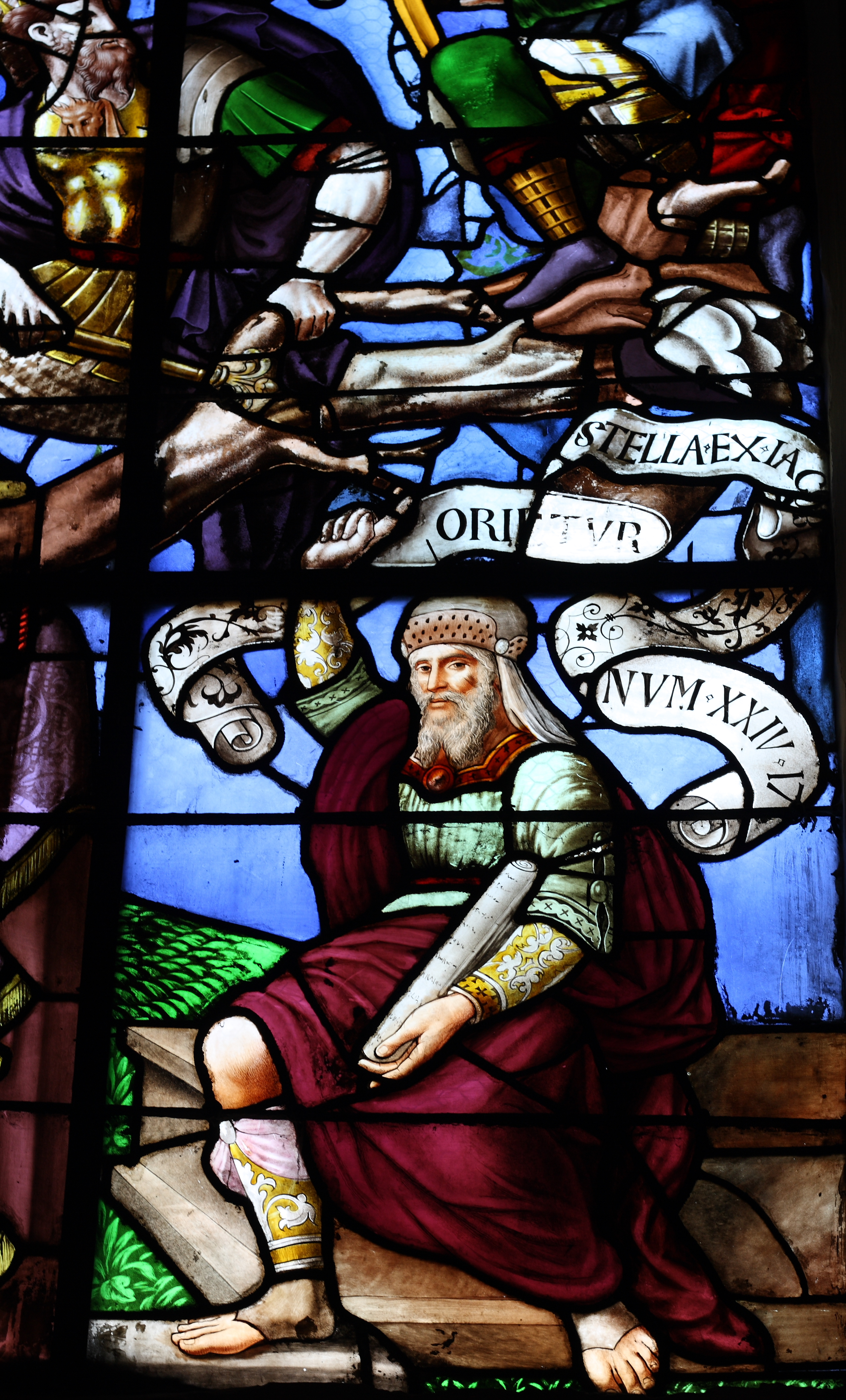 Katholische Pfarrkirche Saint-Martin in Triel-sur-Seine, einer Gemeinde im Département Yvelines; (Île-de-France), Bleiglasfenster, Darstellung: Wurzel Jesse (Ausschnitt)